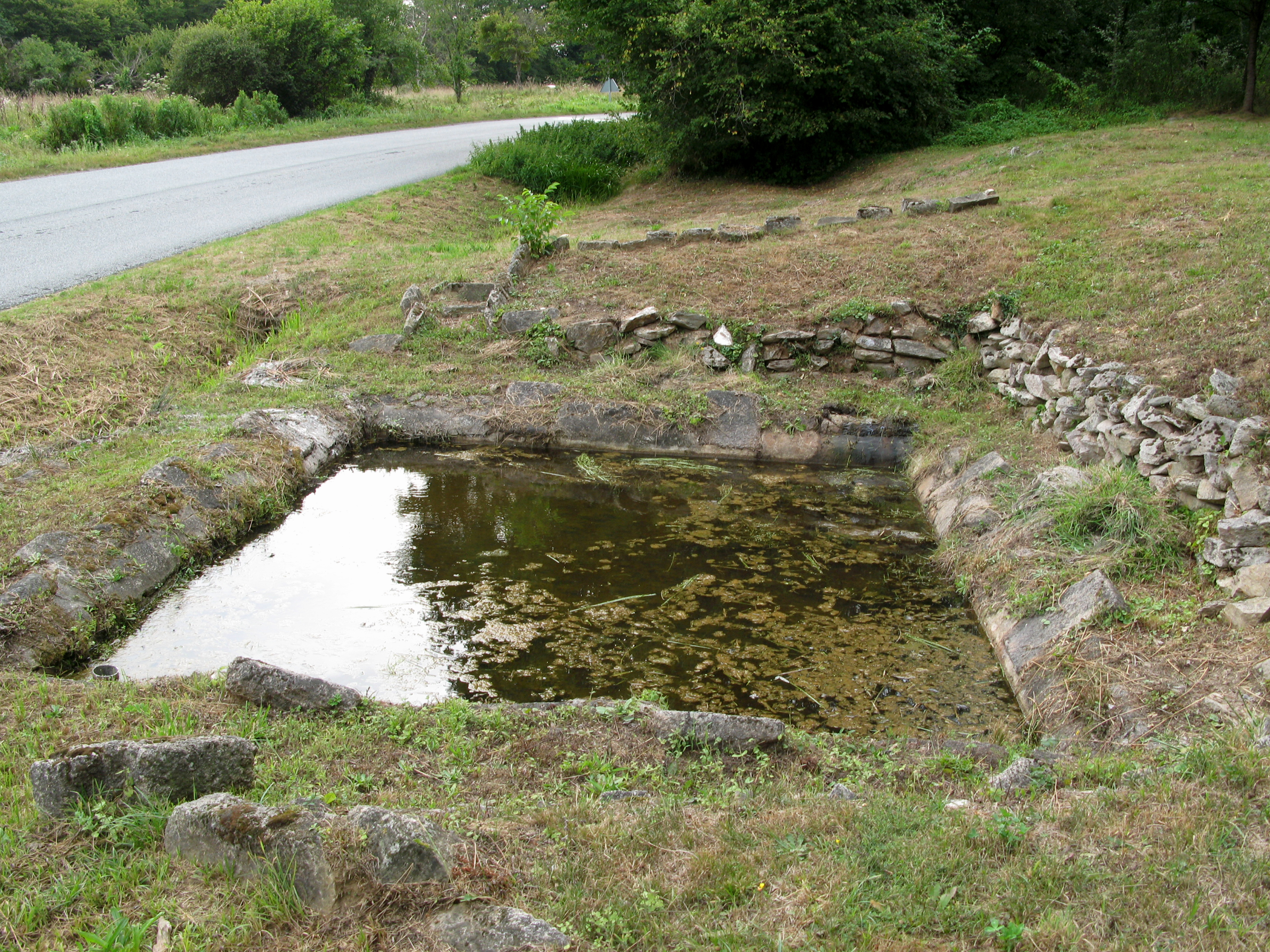 Saint-Sulpice-le-Dunois (Creuse, France) - Lavoir (à l'abandon) du hameau de Champotier, sur le côté Nord de la route départementale D 15. . .